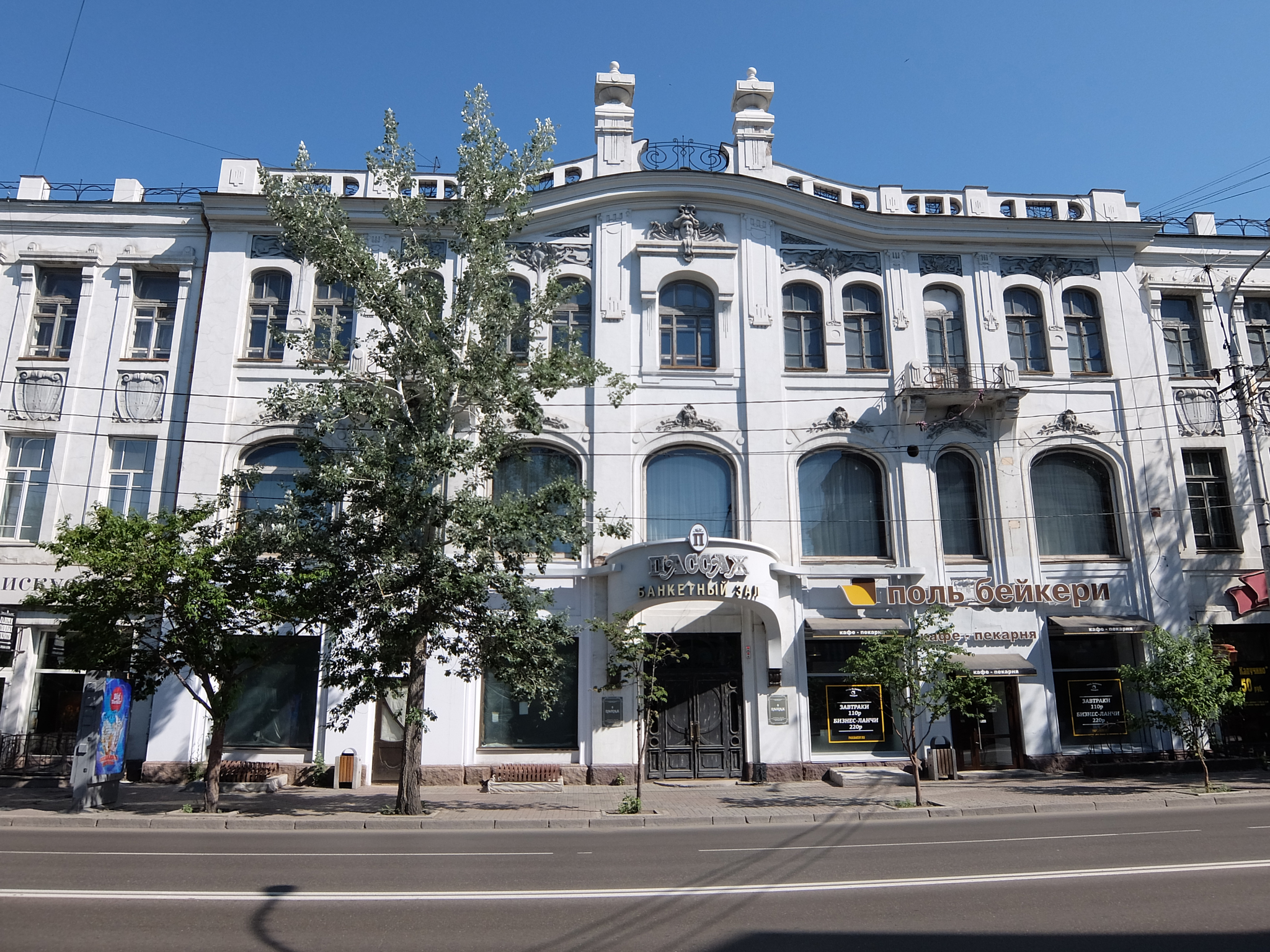 Торговый дом Либмана. 1909-1910 г.г. Стиль: модерн. Арх.: В.А.Соколовский